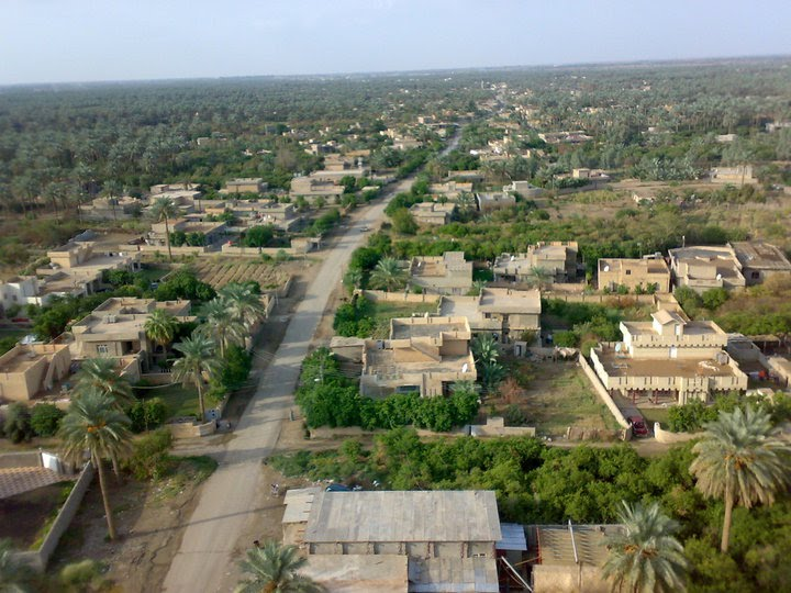 الضلوعية